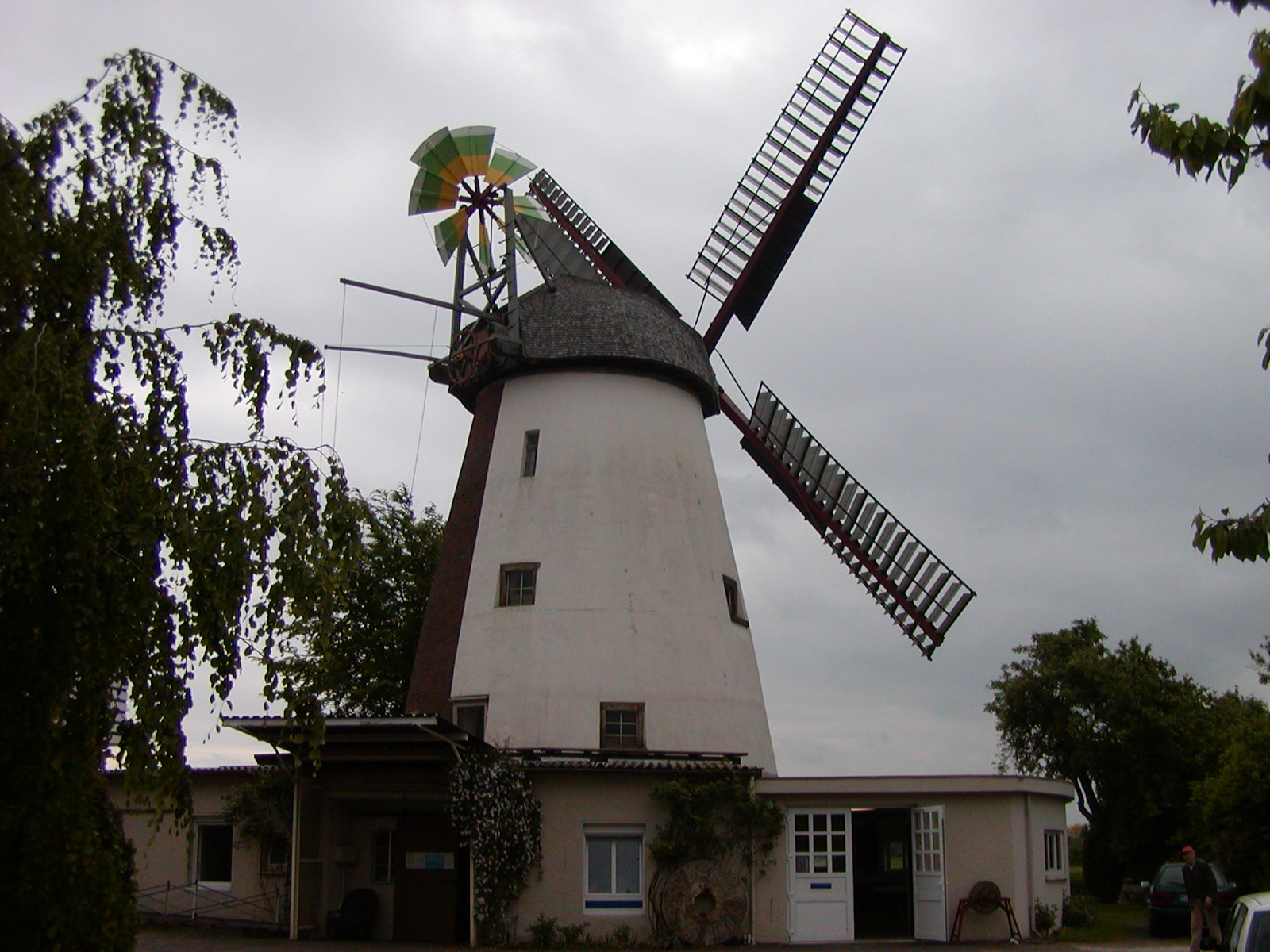 Die Windmühle in Stemmer bei Minden in Nordrhein-Westfalen. Die Mühle ist Teil der Westfälischen Mühlenstraße. Der Wallholländer von 1860 hat einen an der Wetterseite verputzten konischen Ziegelsteinturm. 1997 erhielt er wieder windgängige Jalousieflügel. Ein unverwechselbares Aussehen geben der Mühle die in den Farben des Dorfes weiß-grün-gelb gestrichenen Windrosenblätter. Die Mühle wird als Lager genutzt und ist nur bedingt funktionsfähig.